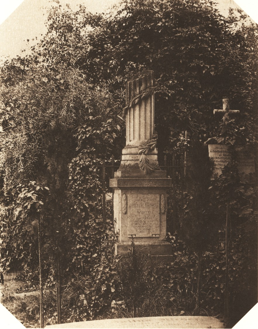 Fotografie des Loschwitzer Kirchfriedhofs.